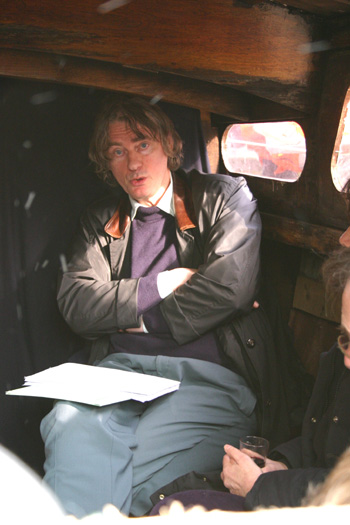 foto van cor gout, prive verzameling